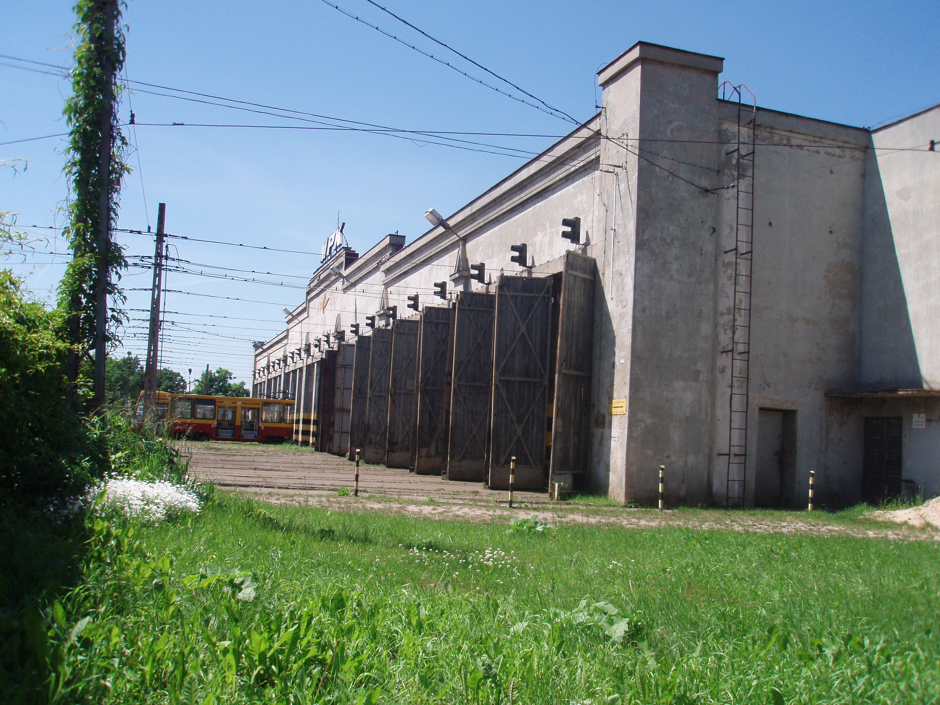 Widok na budynek techniczny zajezdni Dąbrowskiego od ul. Kilińskiego